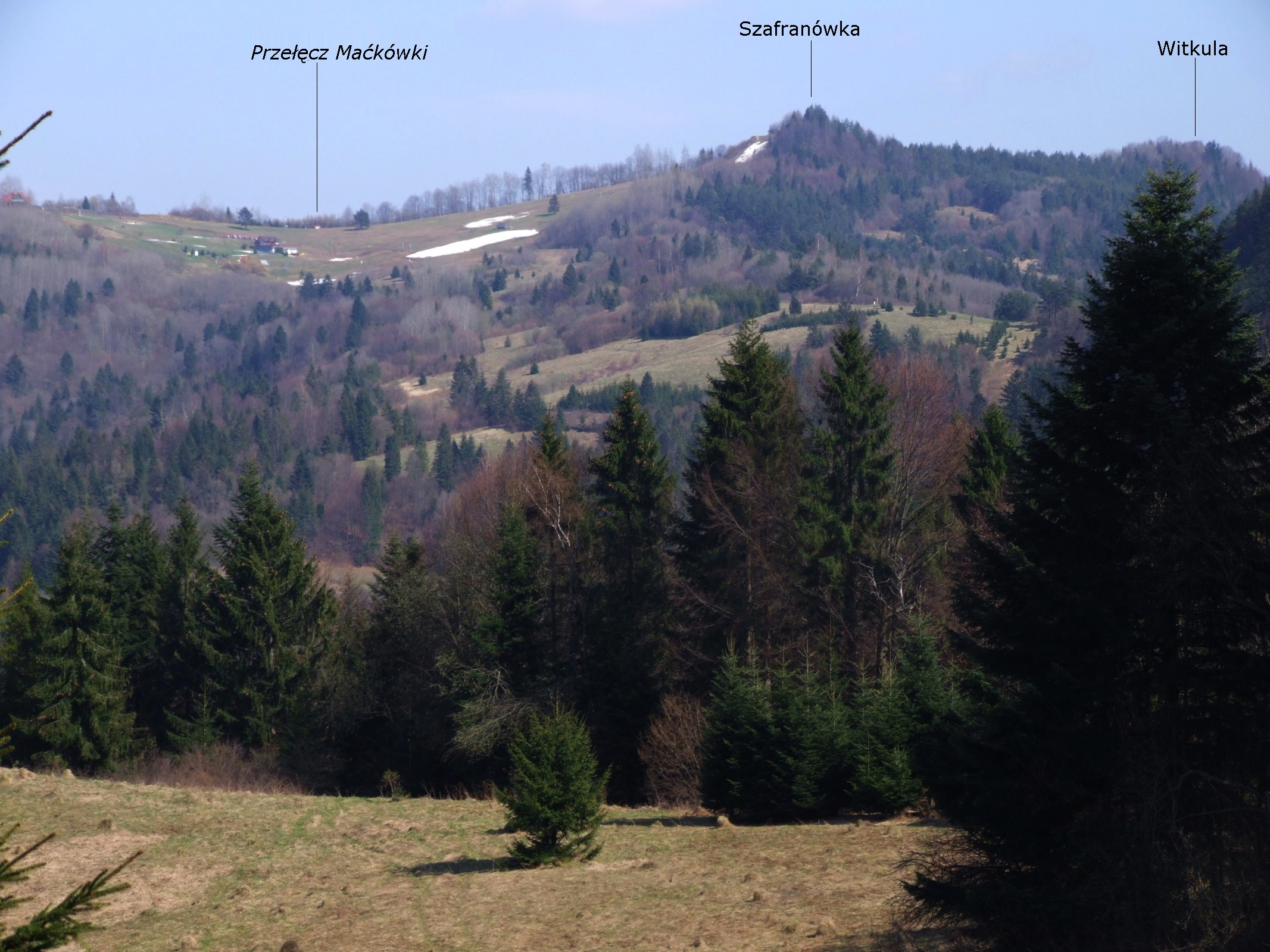 Widok z polany Sosnów pod Sokolicą